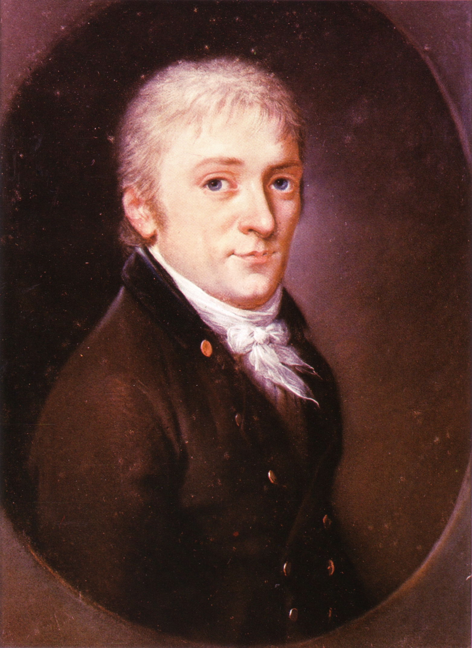 Carl Friedrich Gauß, Pastellgemälde von Johann Christian August Schwartz, 1803, Direktorzimmer der Universitätssternwarte Göttingen, Geismar Landstraße 11.